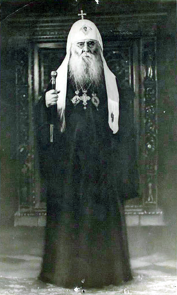 Святейший Патриарх Сергий (Страгородский) в полный рост в патриаршем куколе, с посохом в правой руке.